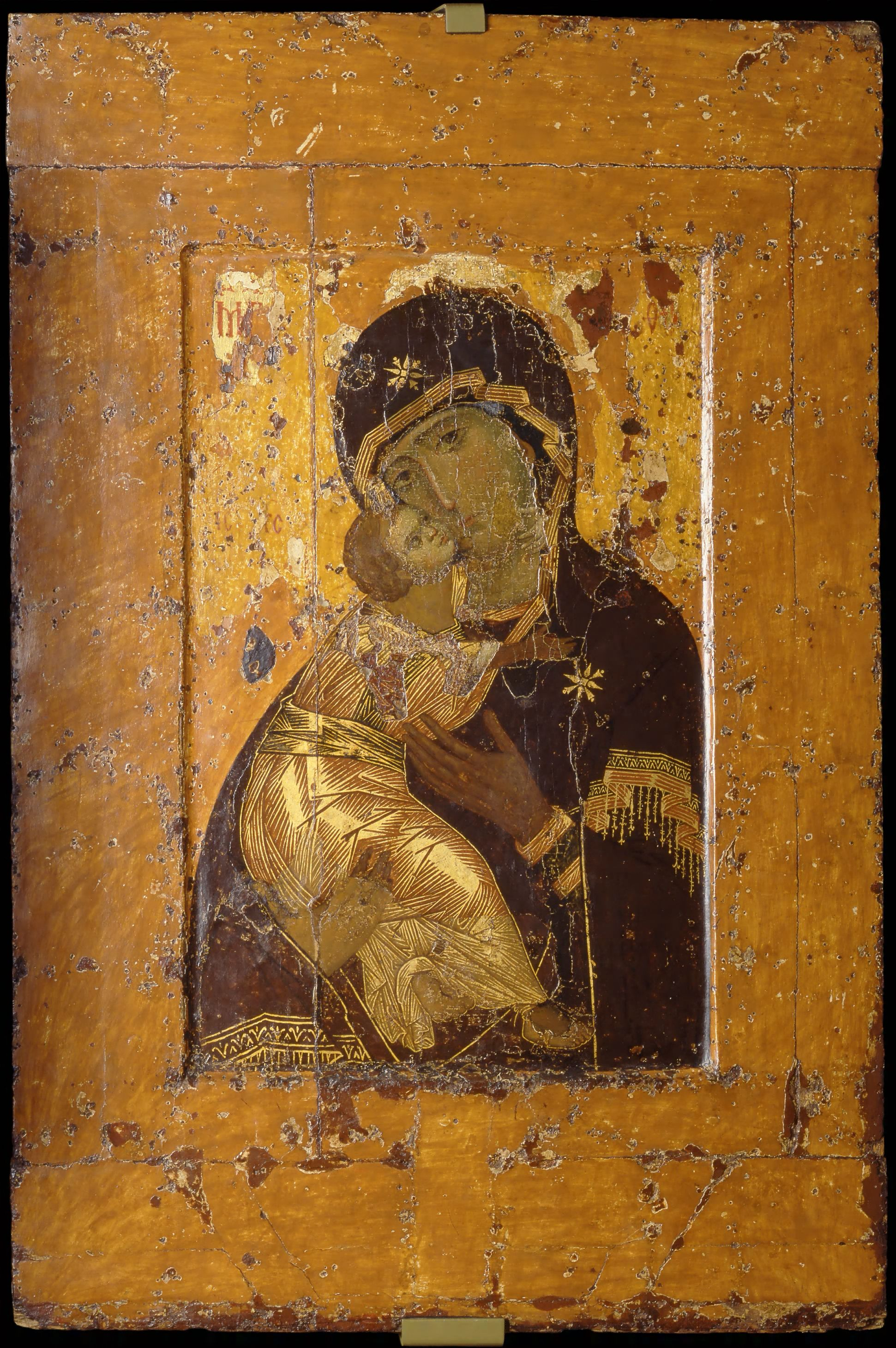 Ikone der Gottesmutter von Vladimir